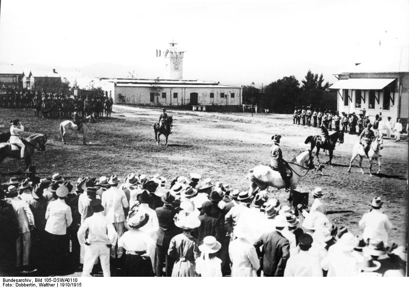 Gouverneur Exz. Seitz nimmt die Parade ab